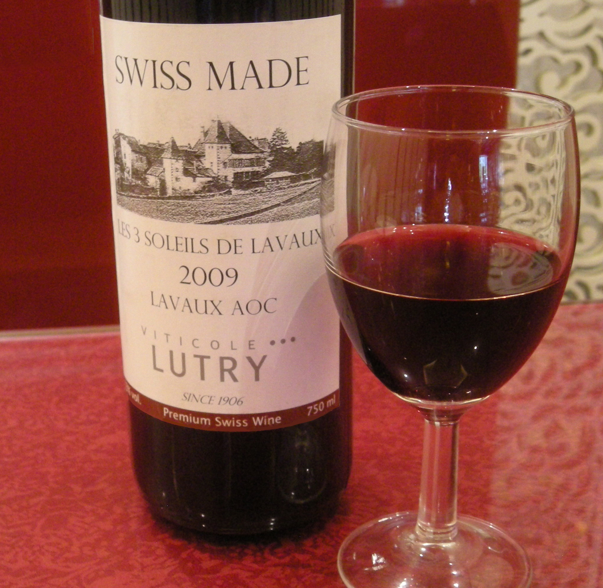 Vin Lavaux AOC Gamaret GaranoirUnknownUnknown wine of lavaux aoc gamaret garanoir